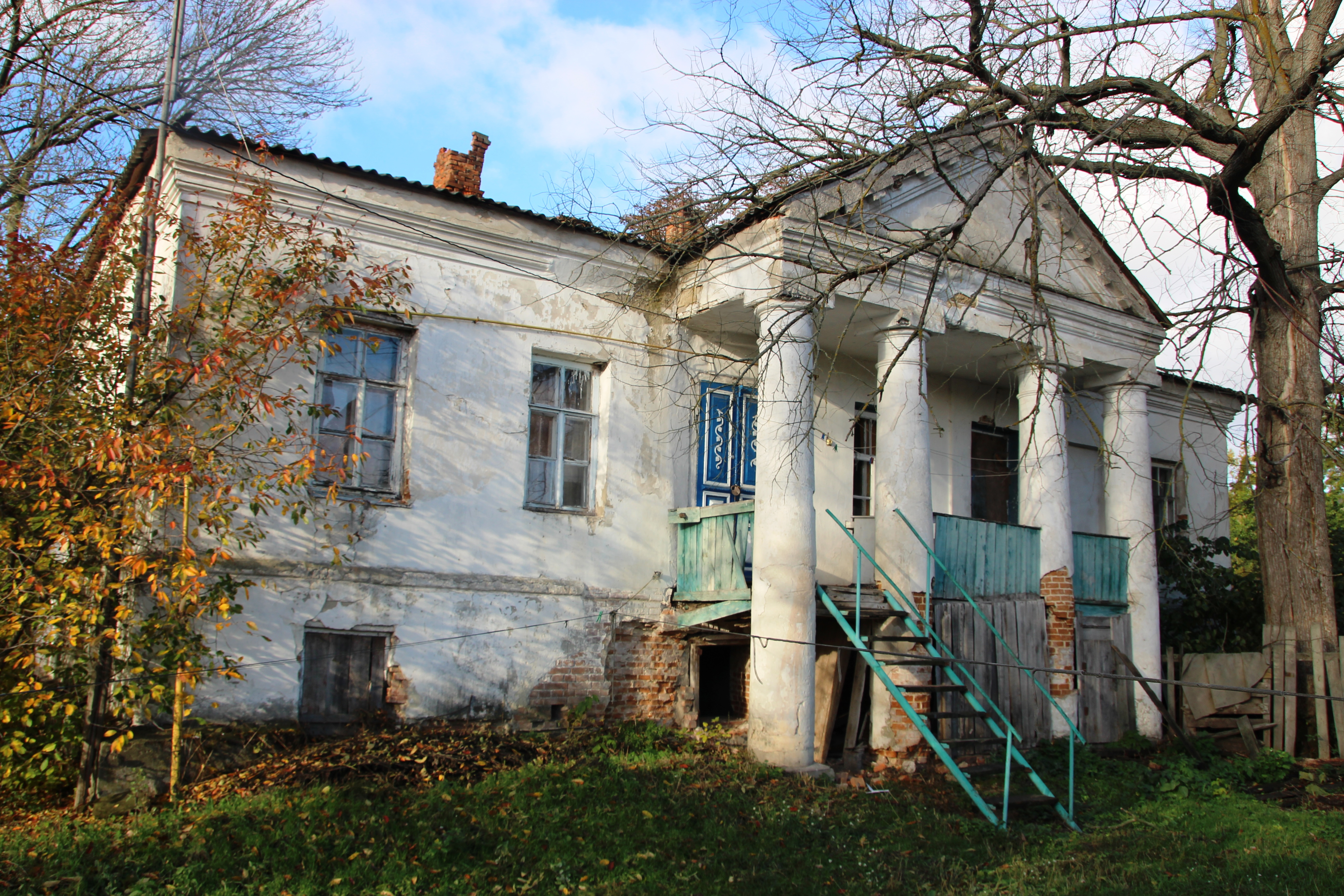 Флігель, село Михайлівка, вул. Трихліба